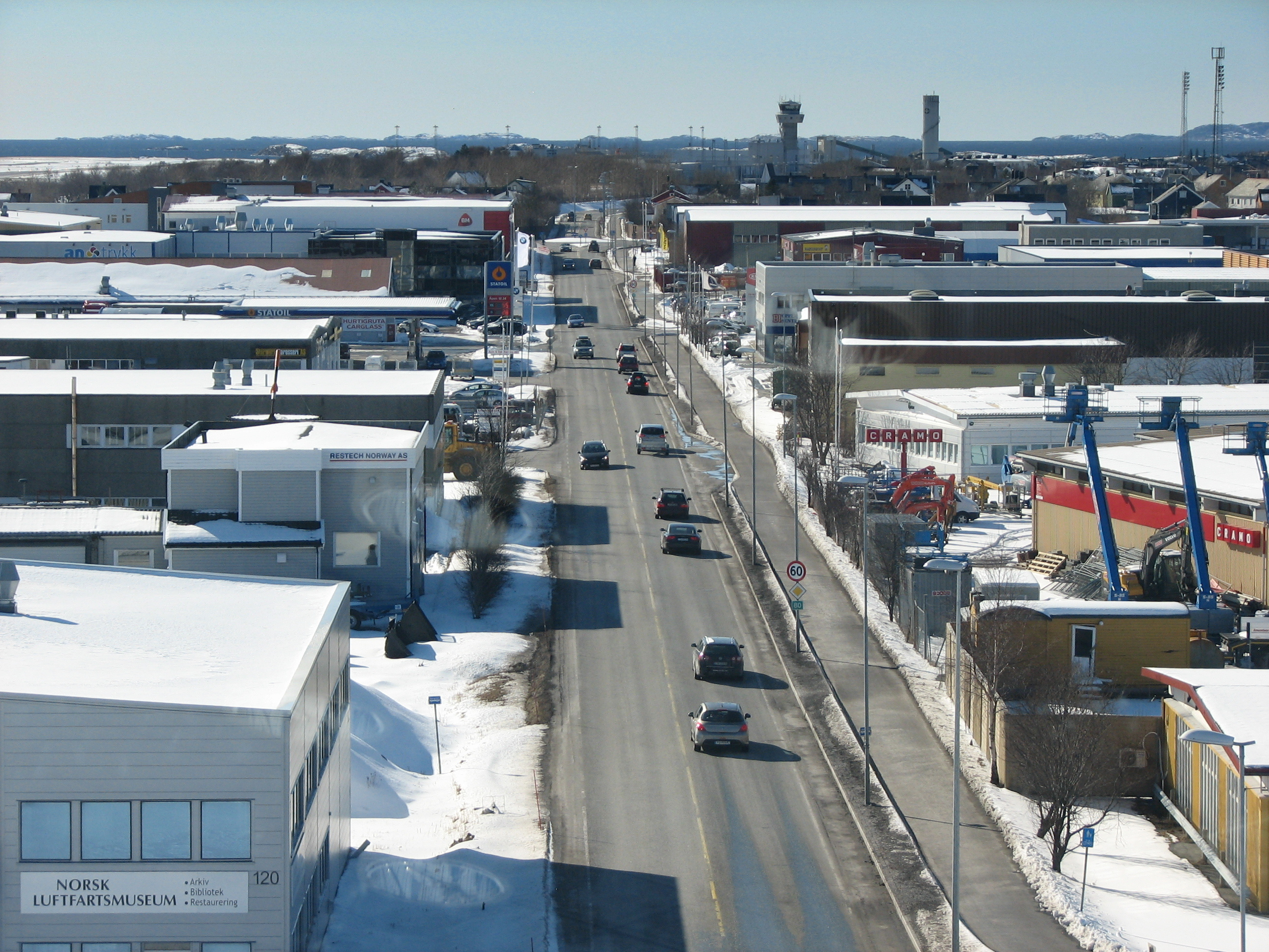 Olav V gt., Bodø